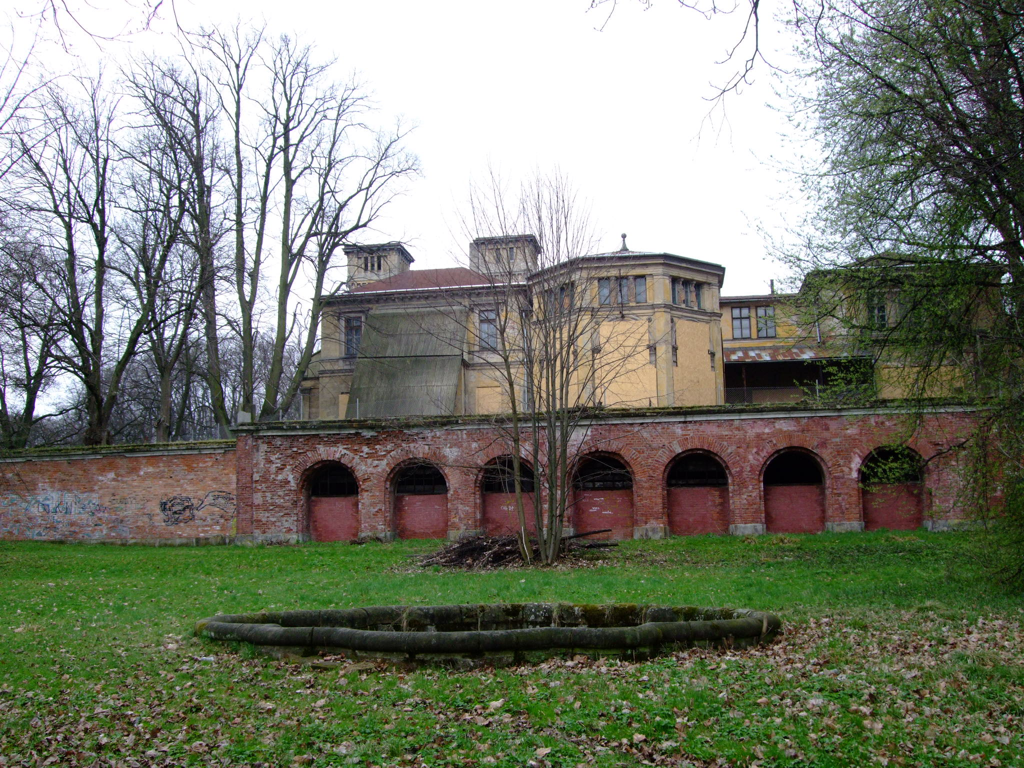 Pałac Potockich w Krzeszowicach.